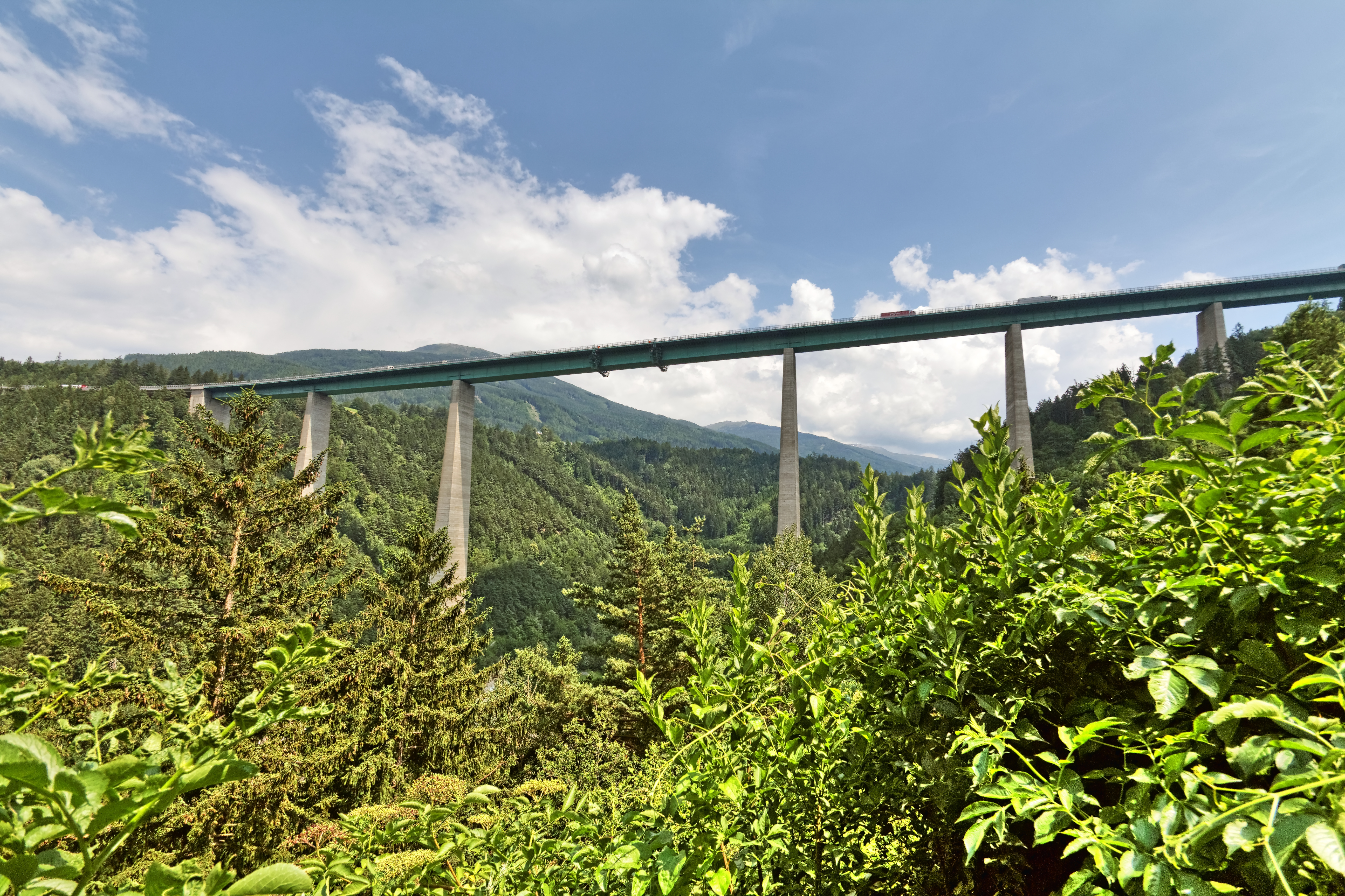 Europabrücke Brennerautobahn Tirol